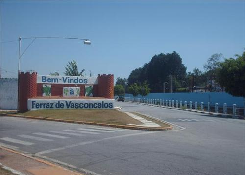 entrada ferraz de vasconcelos